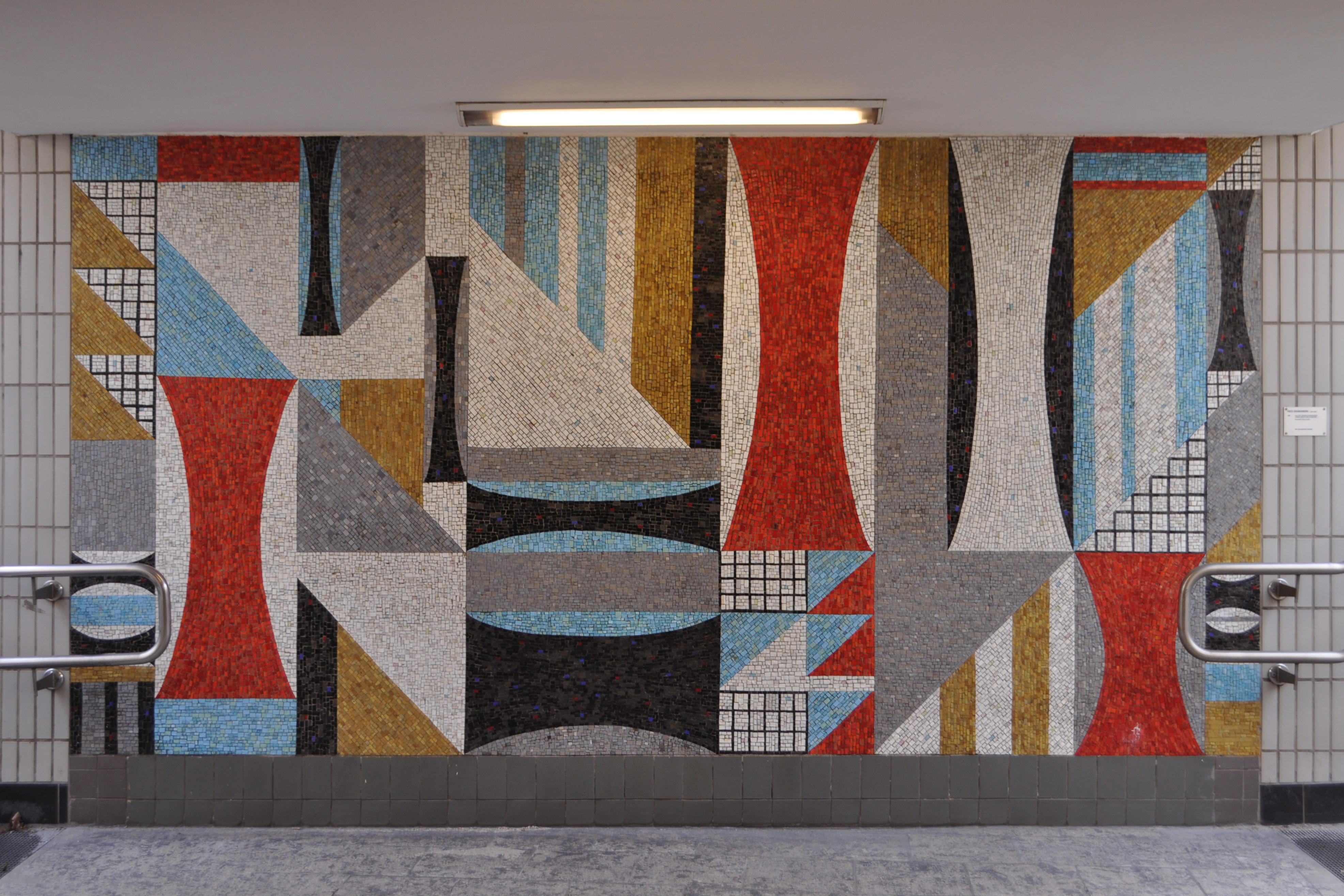 Glasmosaik (1960) von Fritz Kronenberg im U-Bahnhof Meßberg in Hamburg-Altstadt.